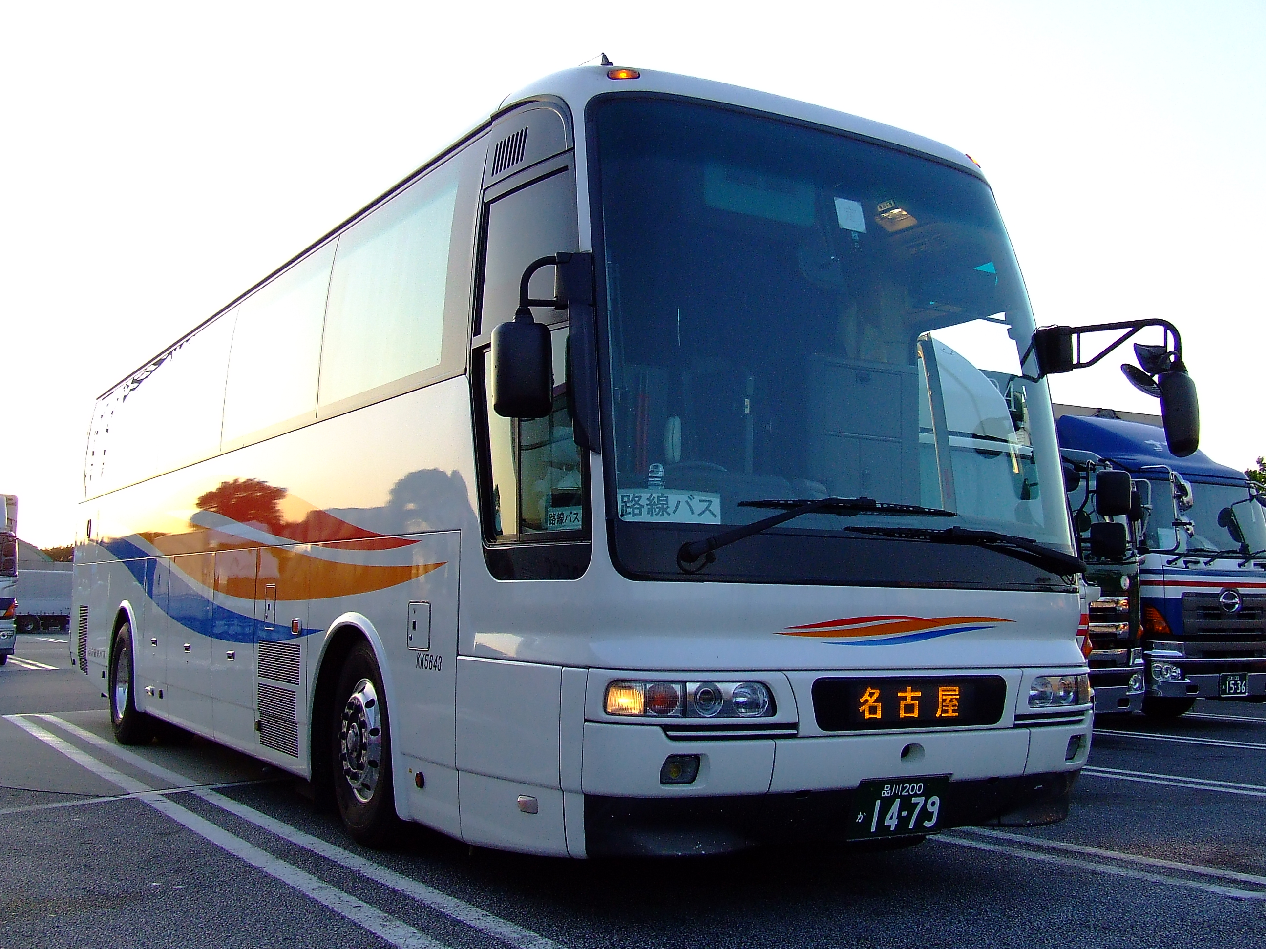 京急高速バスラメール号（京急観光バス）名古屋行き 東名高速道路上郷サービスエリアにて